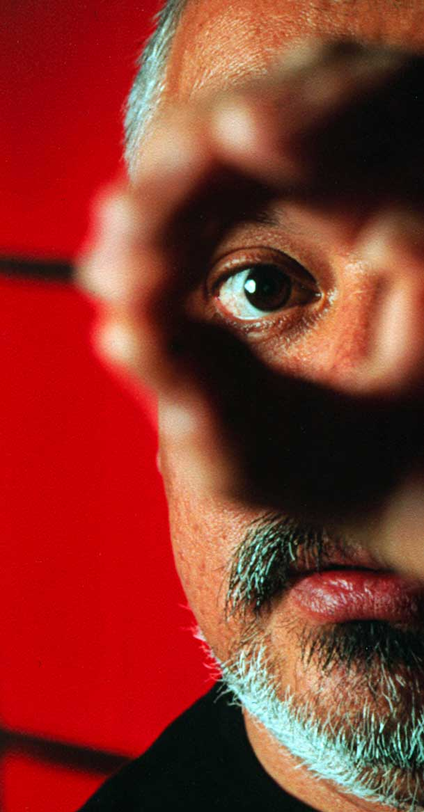 fotografía de Luis Kelly